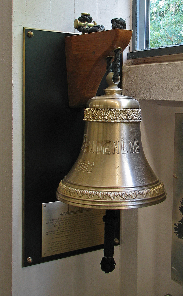 Beschreibung: Schiffsglocke der SMS Frauenlob Fotograf: Darkone, 3. September 2005